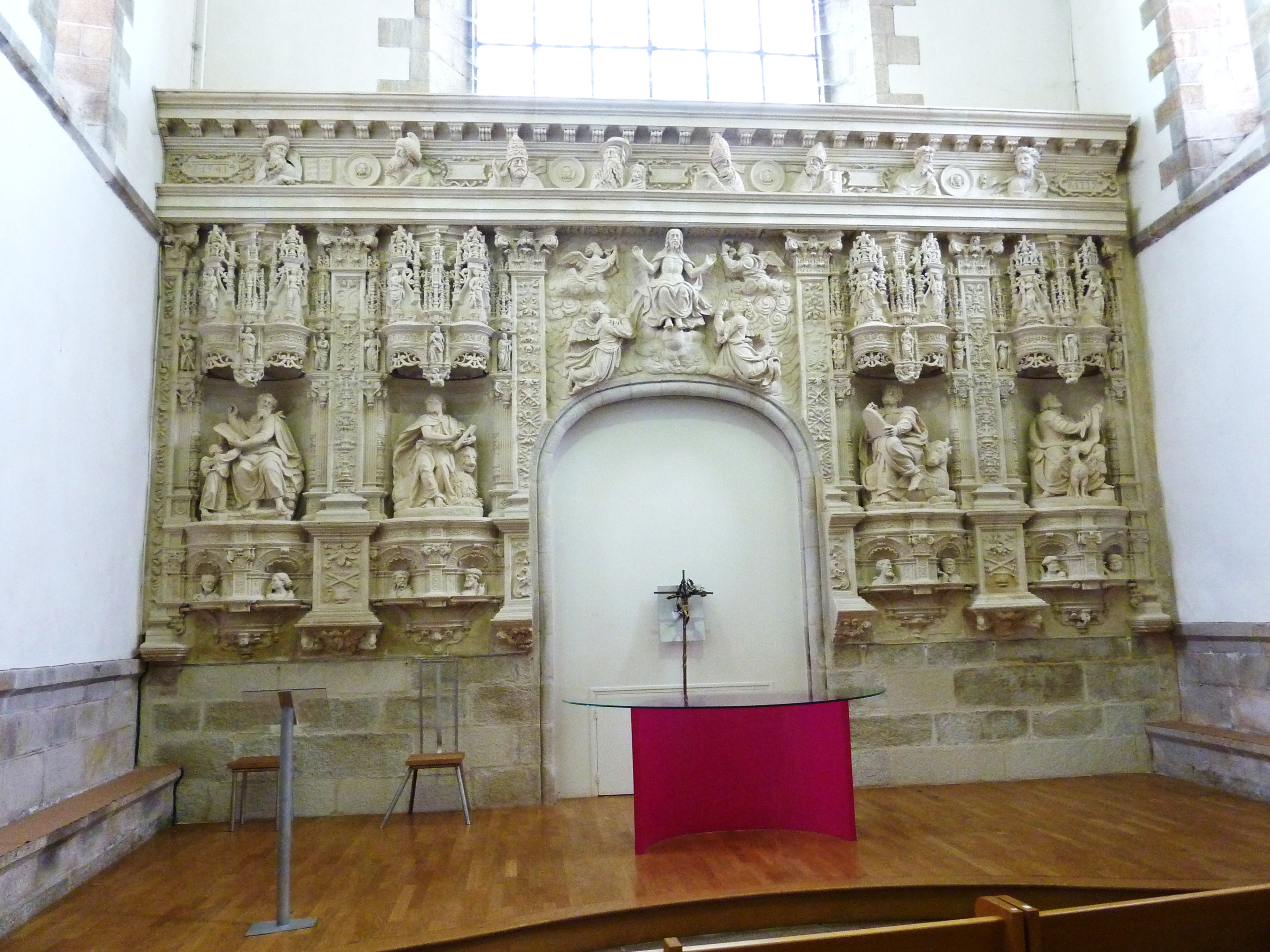 Quimperlé Eglise abbatiale Sainte-Croix Le retable